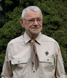 MVDr. Jiří Ládr - Bongo